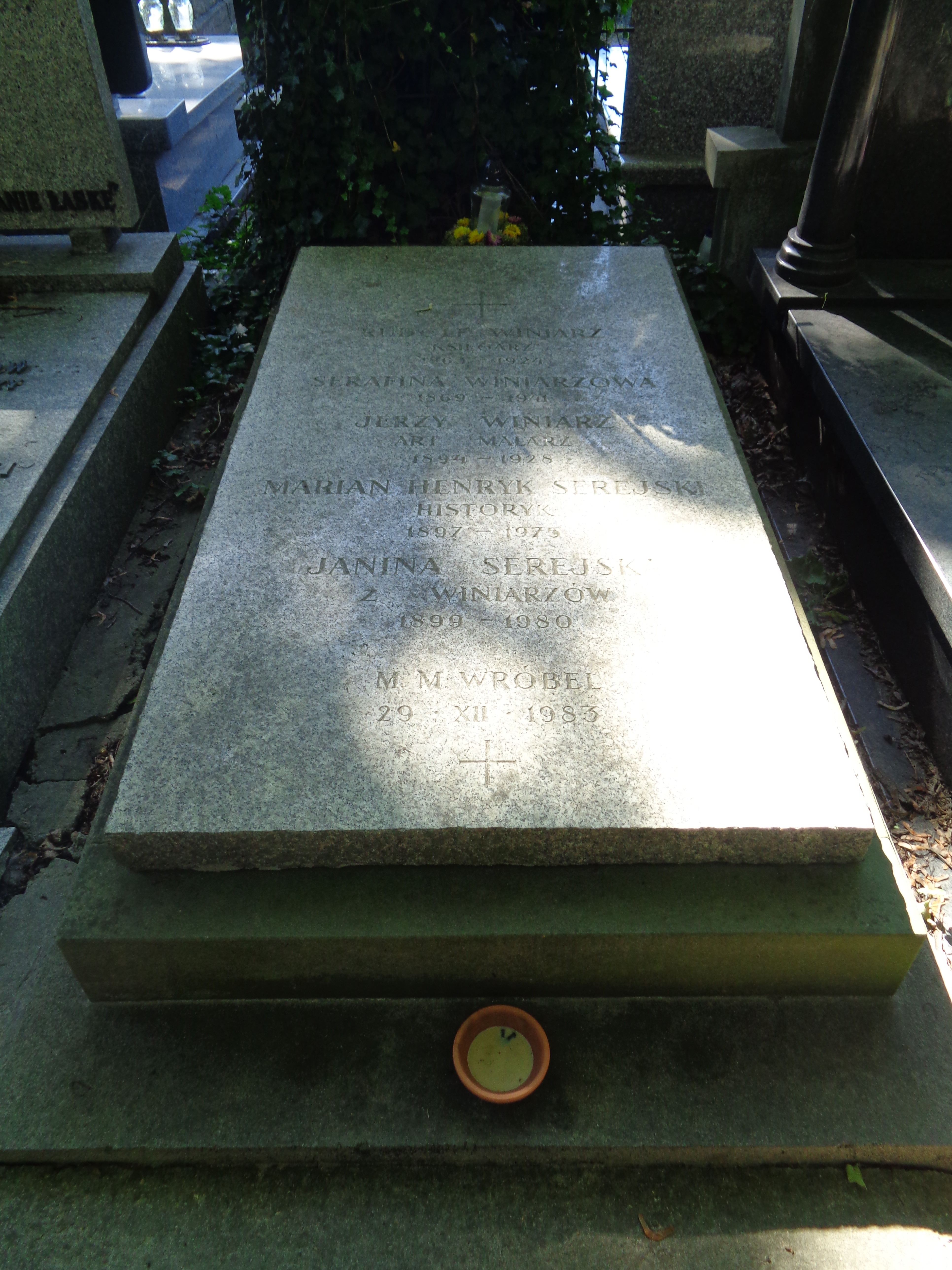 Grób Mariana Henryka Serejskiego i Jerzego Winiarza na Cmentarzu Powązkowskim